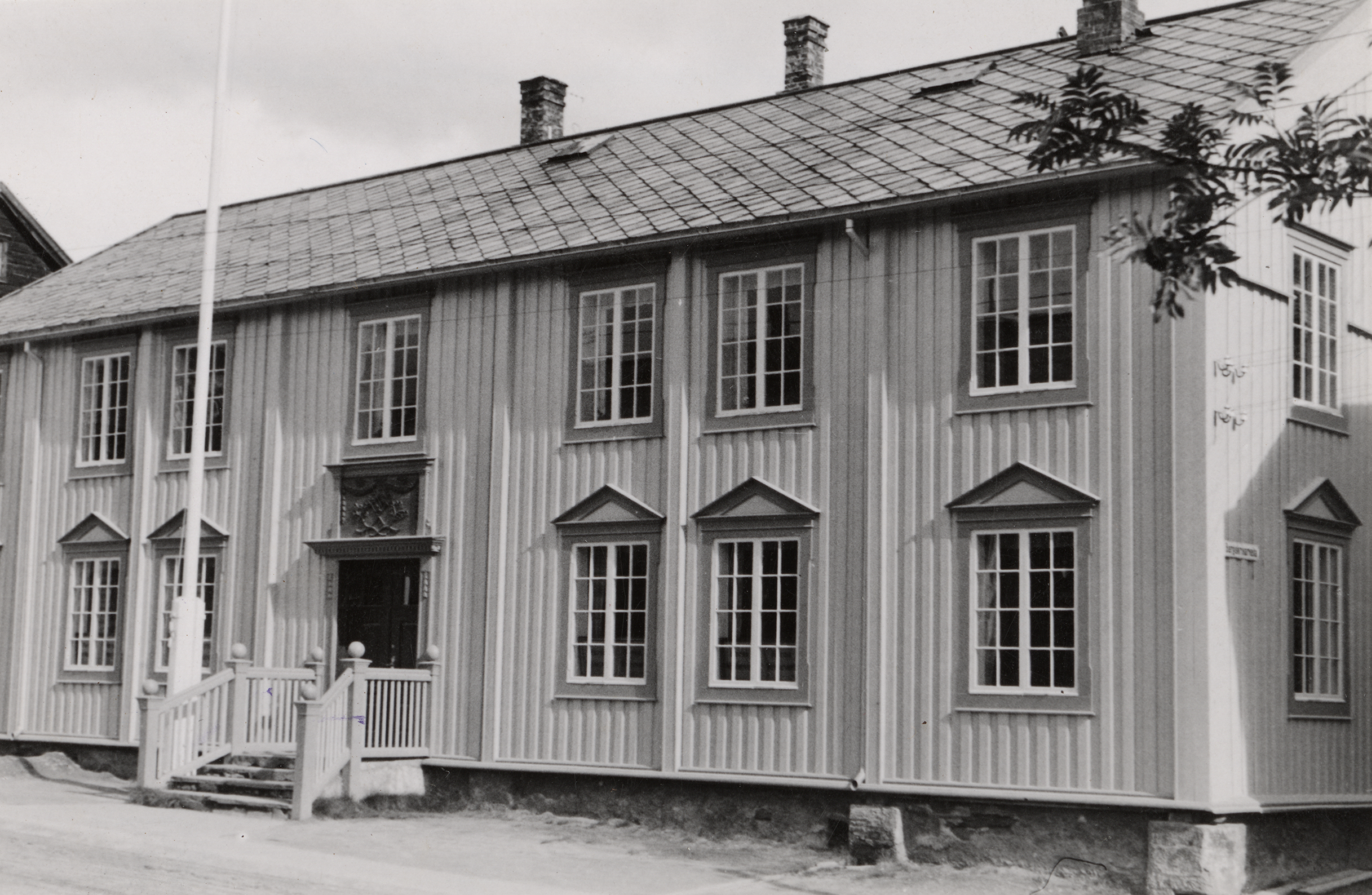 Bergskrivergården i Røros by, Sør-Trøndelag